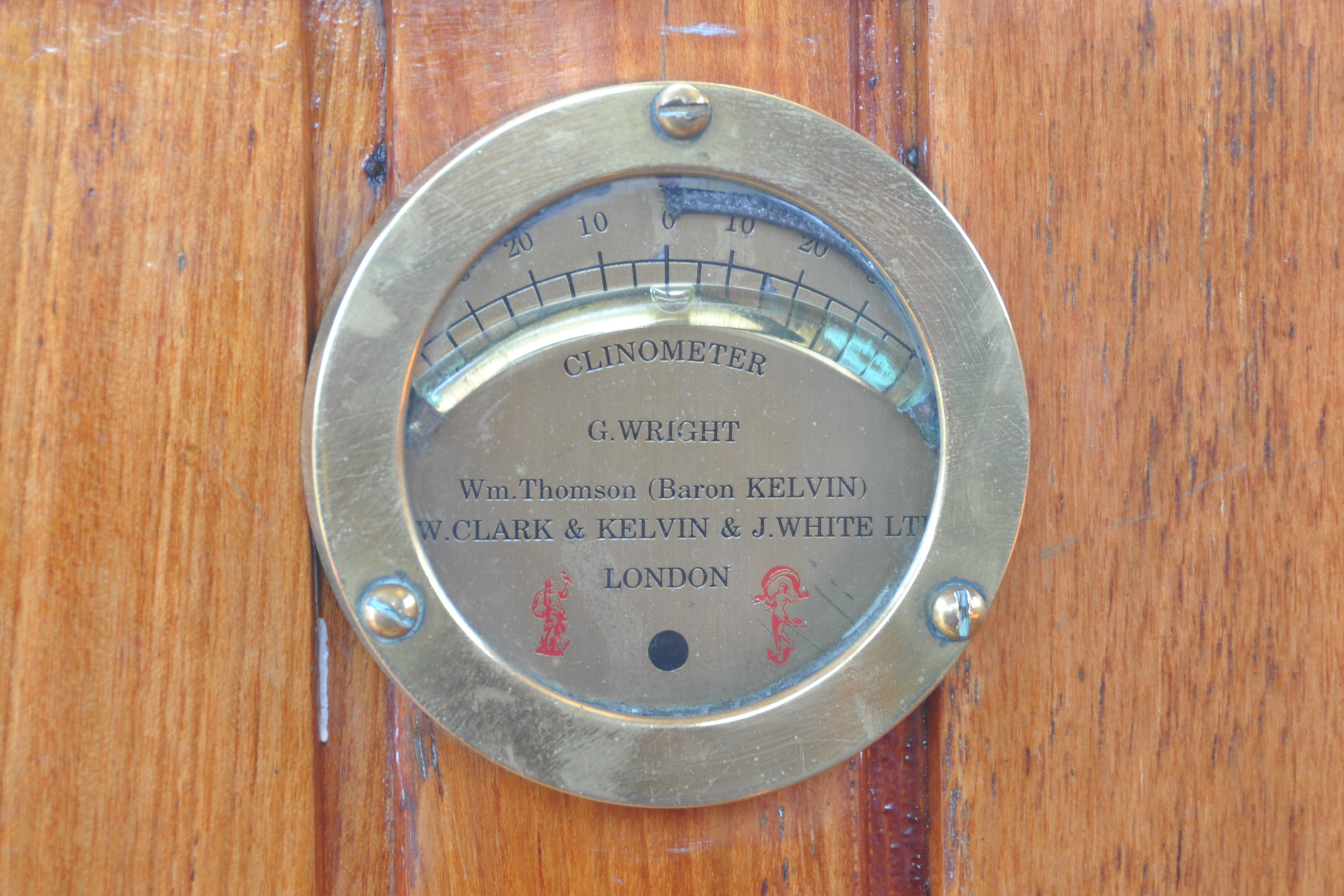 Het stuurhuis van de CHRISTIAAN BRUNINGS.